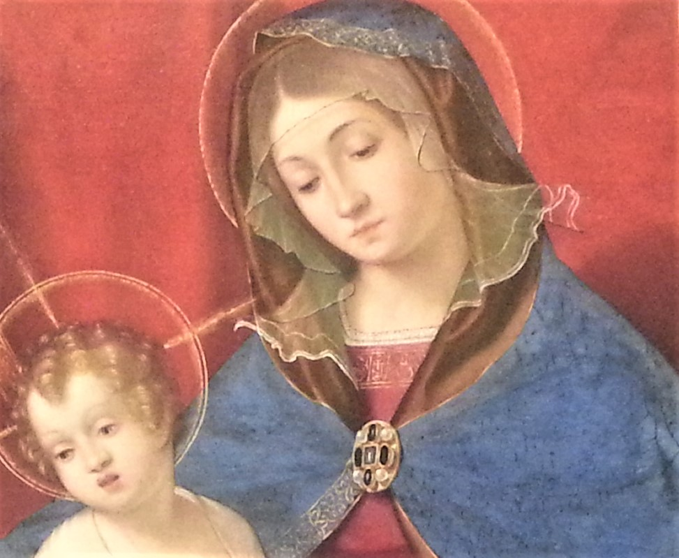 Particolaree del quadro di Andrea Previtali Madonna Casotti